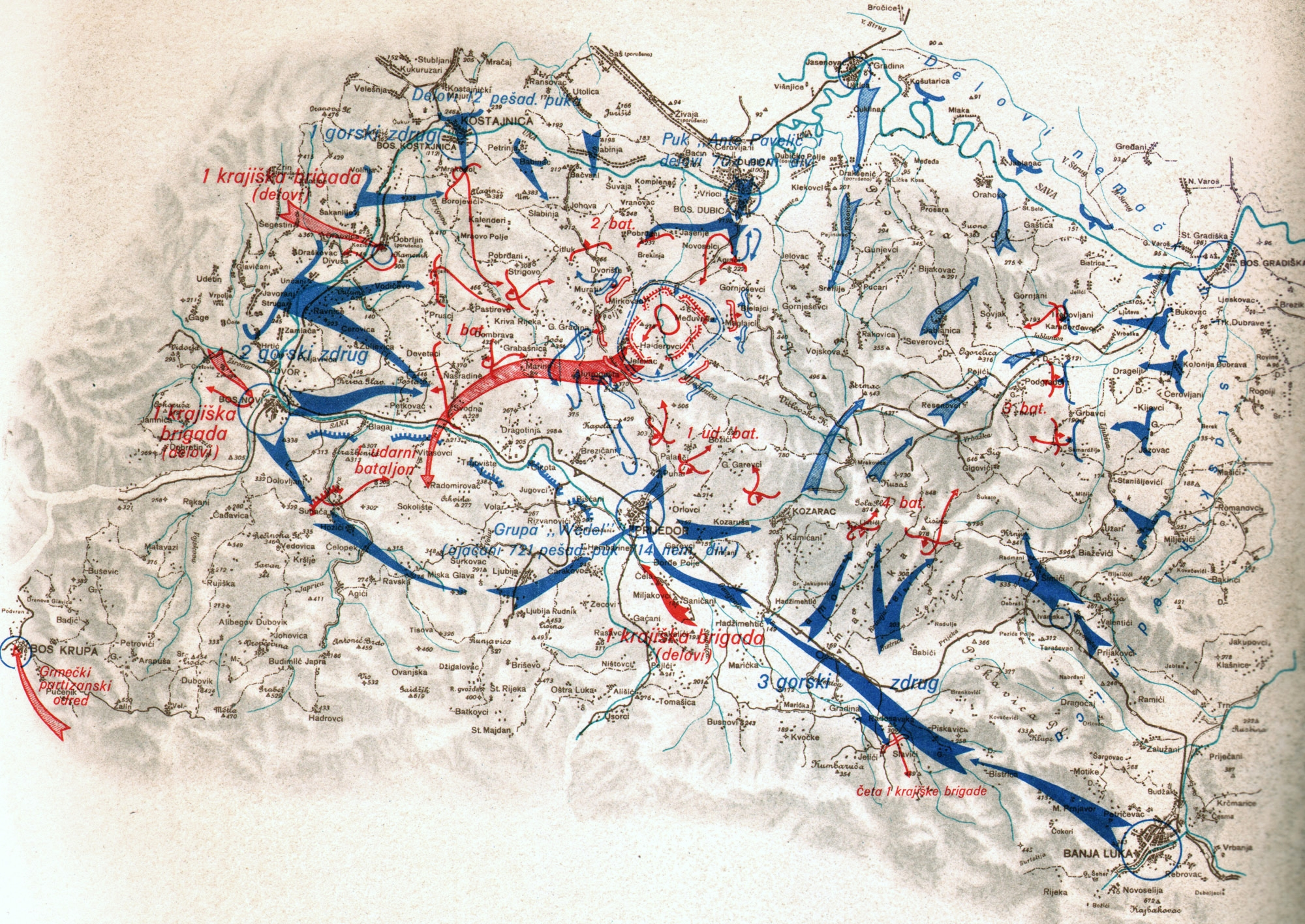 Srpskohrvatski / српскохрватски: Neprijateljska ofanziva na Kozari (od 10 juna do 16 jula 1942 godine)